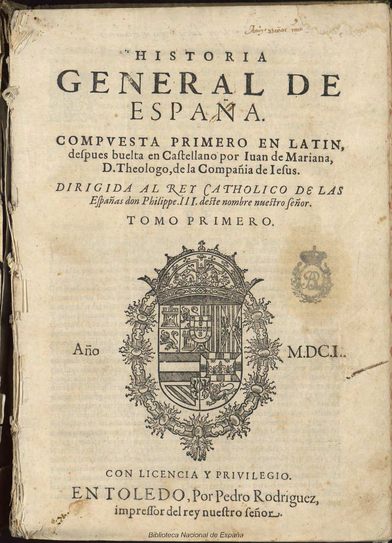 Historia general de España, compuesta primero en latin, despues buelta en castellano por Juan de Mariana ... en dos tomos Autor: Mariana, Juan de (1536-1624) Fecha: 1601 Datos de edición: En Toledo Por Pedro Rodriguez